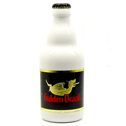 Gulden Draak, Dragon d'or, Belgian Barley Wine, 33cl bottle